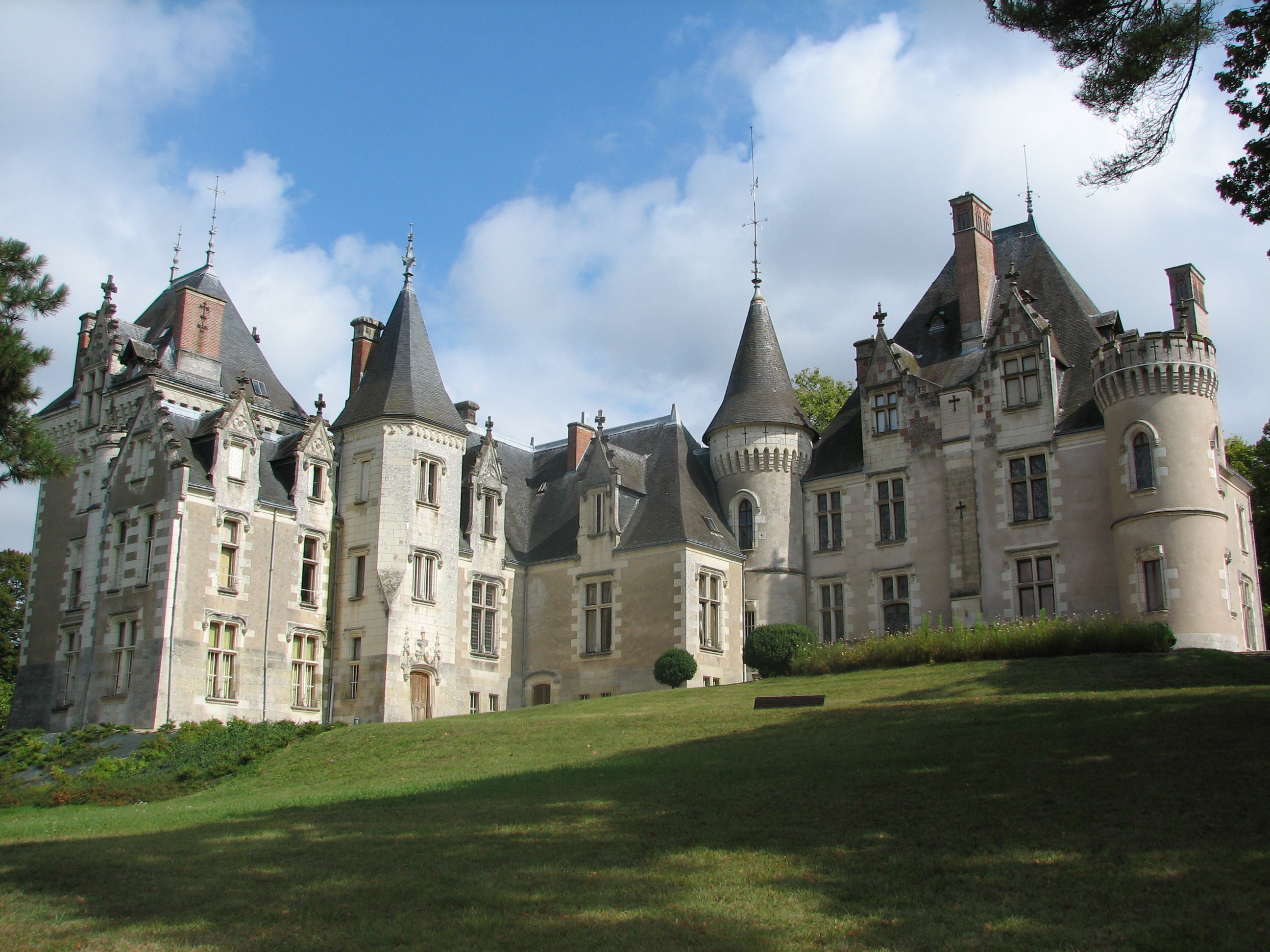 Château de Candé à Monts